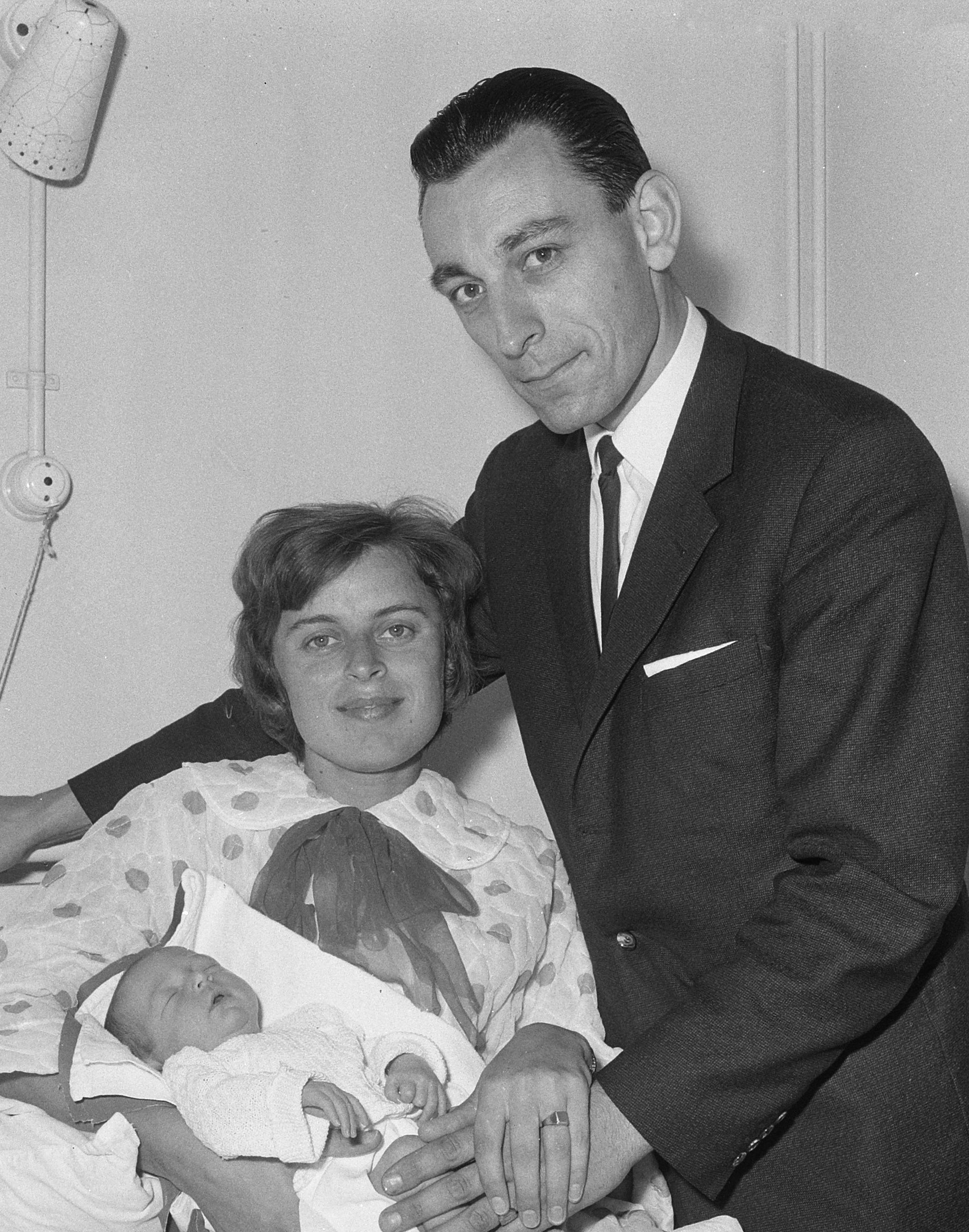 Tilly van der Made van der Zwaard met baby Eveline Daphn